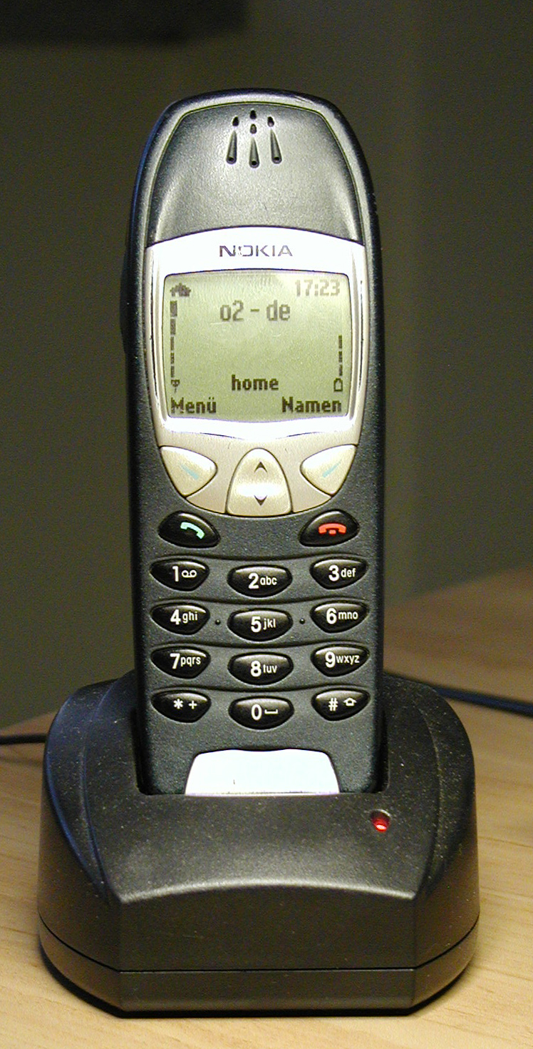 Das Nokia 6210 mit der Ladestation